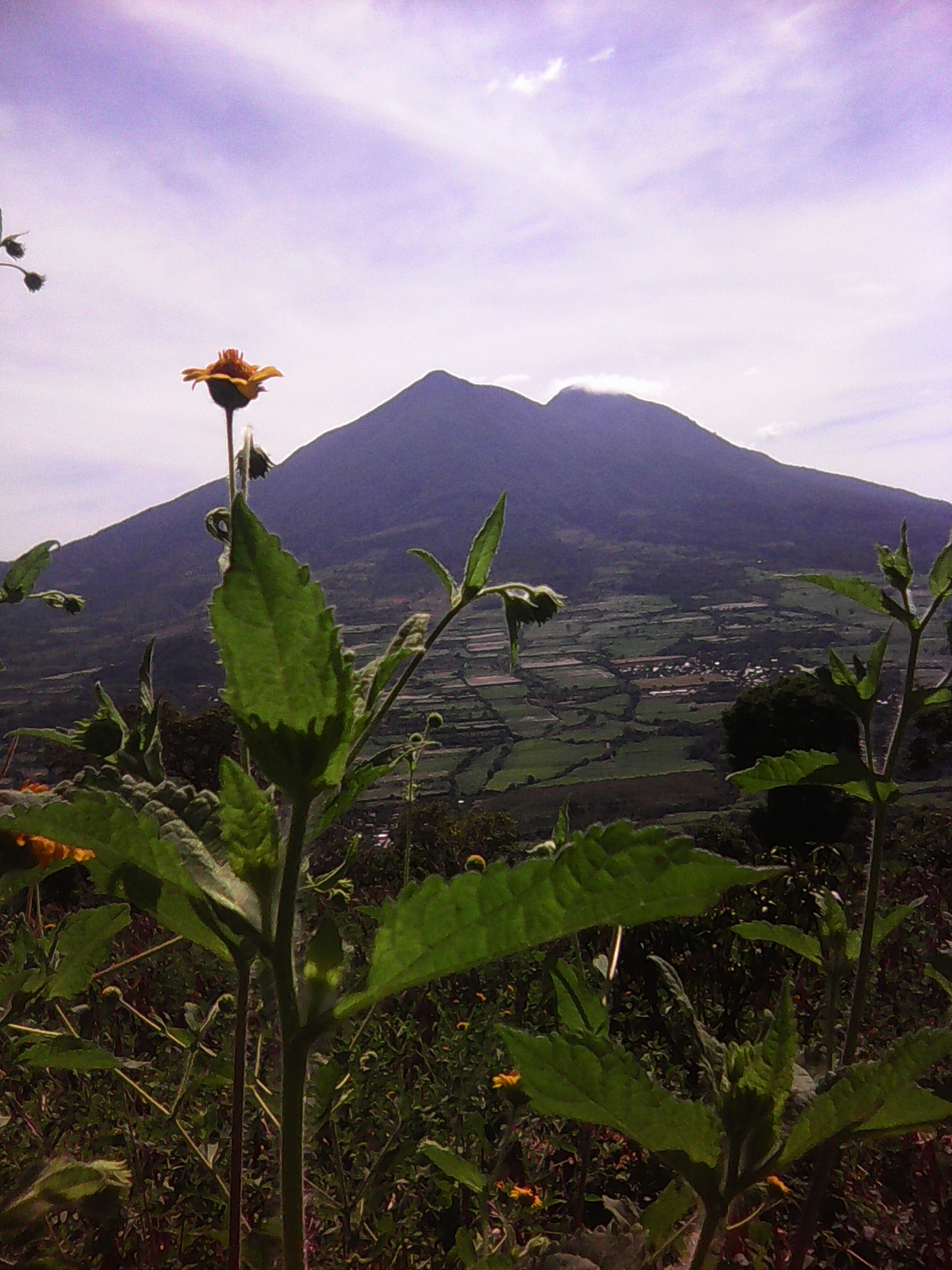 Vista del volcán desde el Cerro Grande